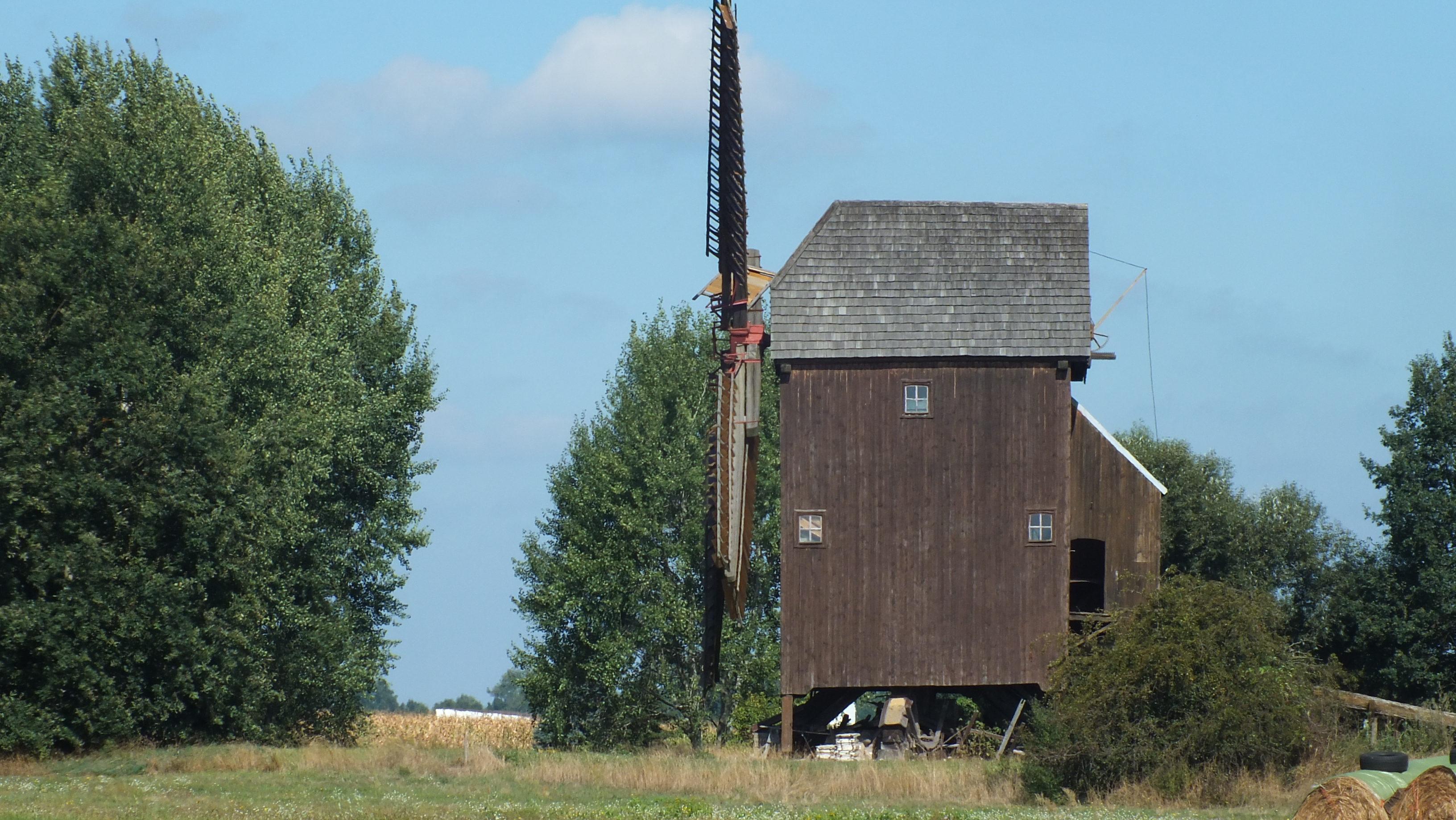 Windmühle in Groß Naundorf (Annaburg)